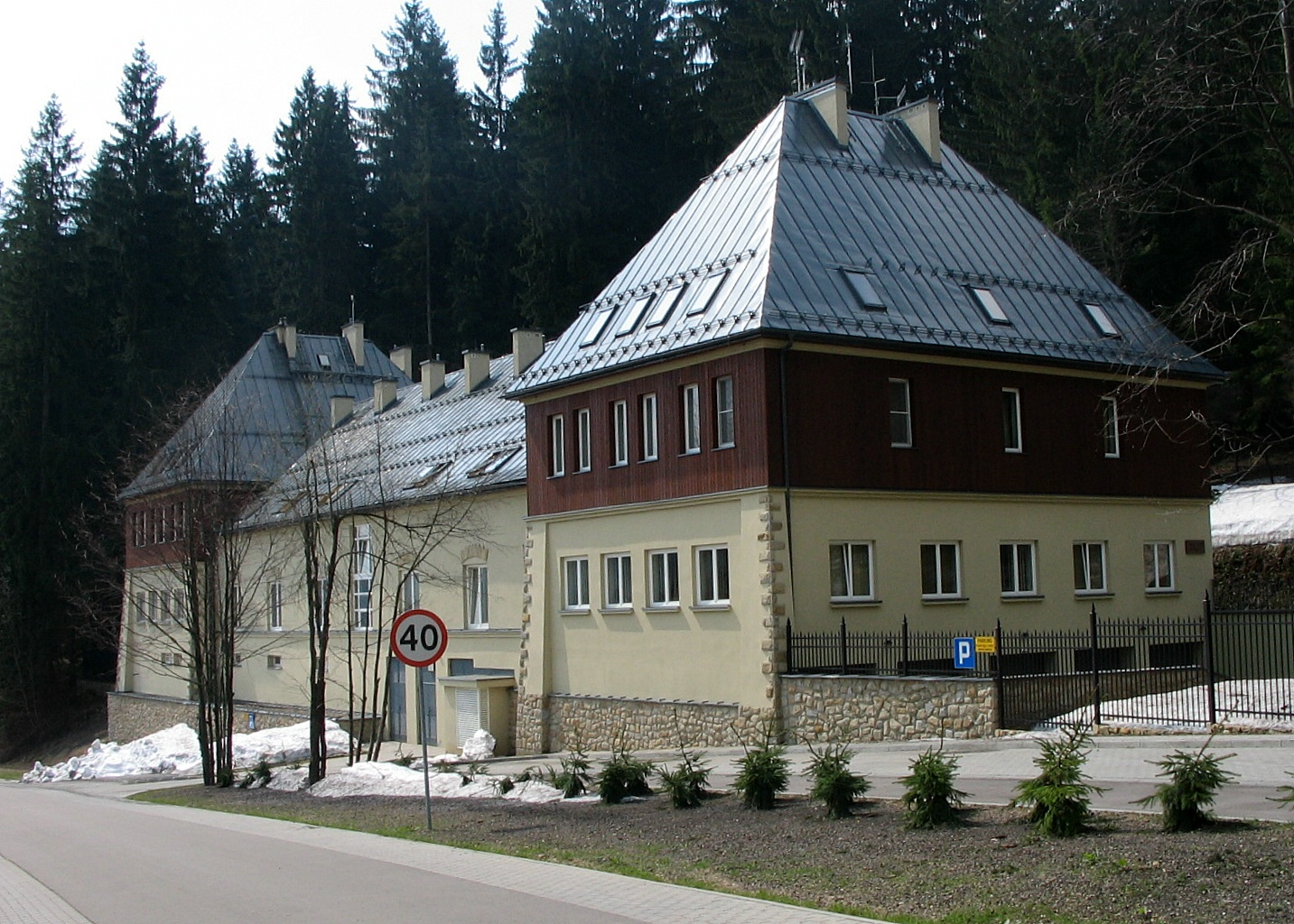 Wisła - Zameczek Prezydenta - Wozownia (prawdpodobnie)